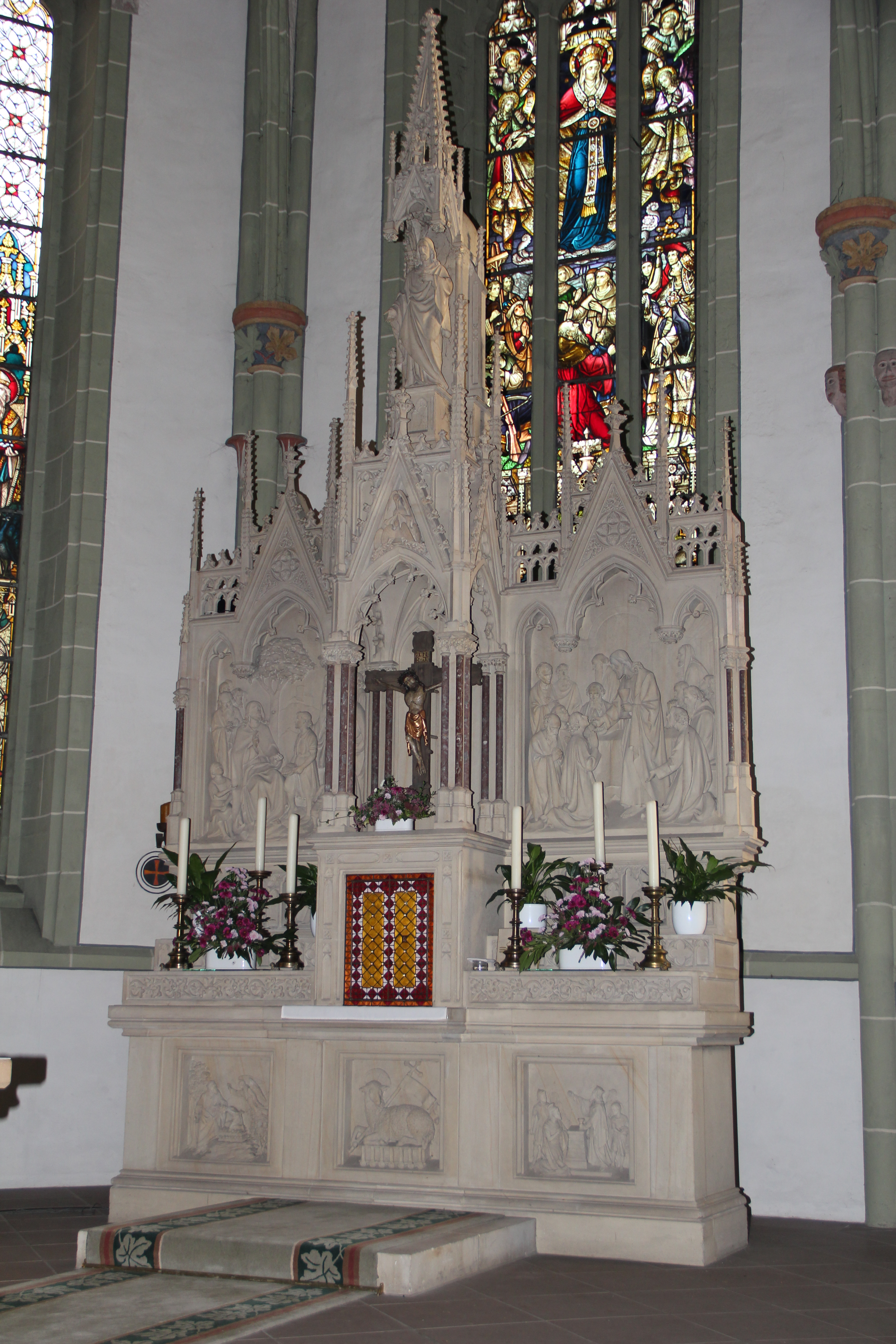 Hochaltar der Sankt-Mariä-Heimsuchung-Kirche in Warburg